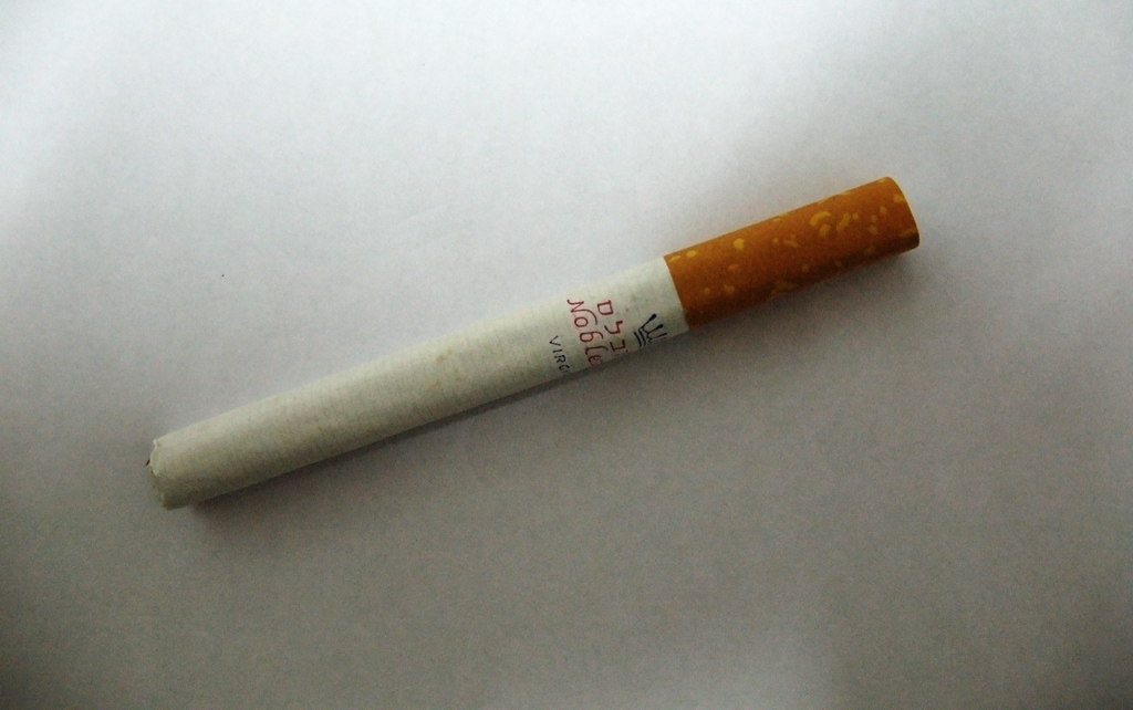 Noblesse (Virginia Filter) cigarette